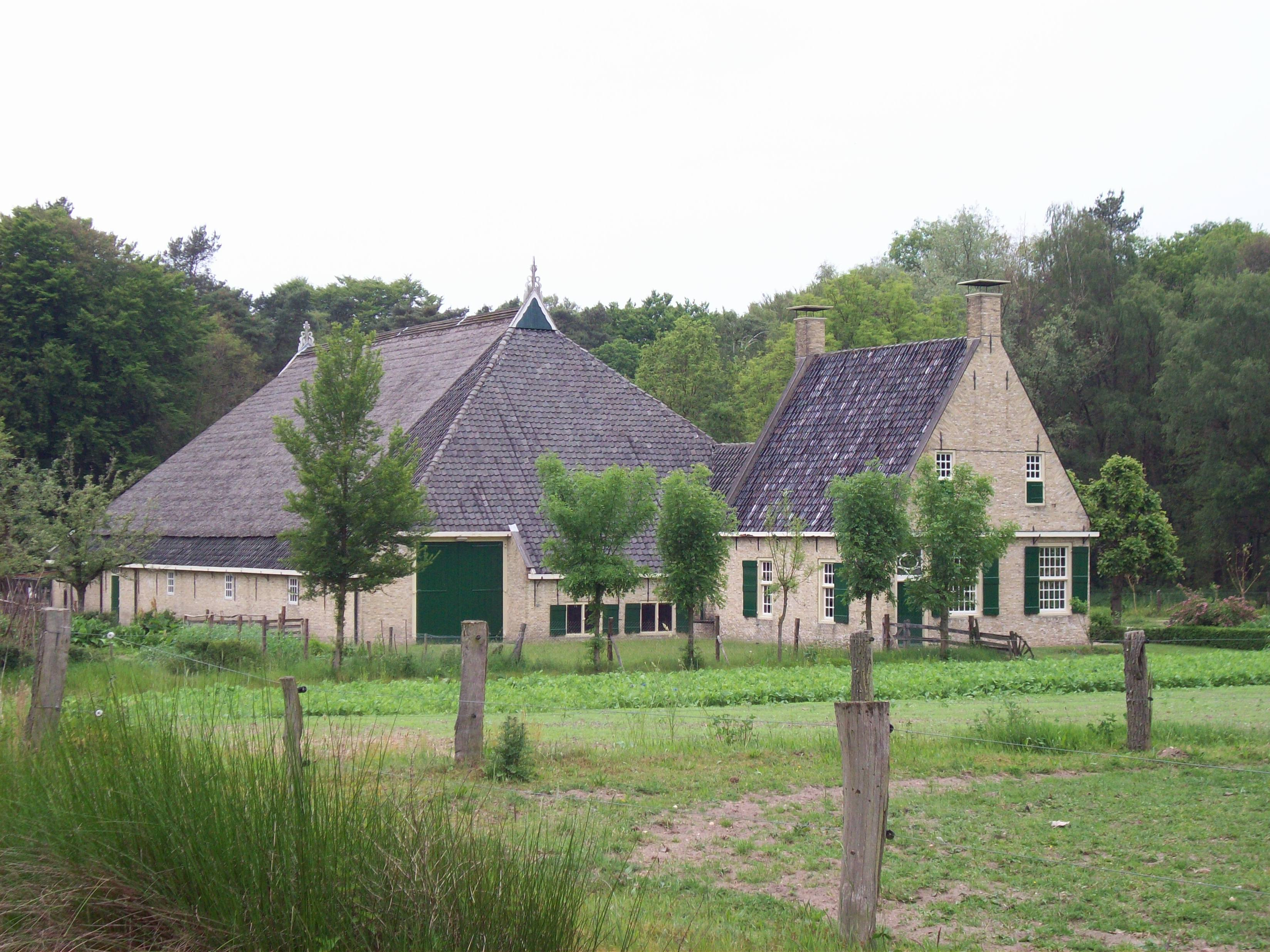 Kop-hals-rompboerderij Friesland Midlum 17e eeuw 1963-1968